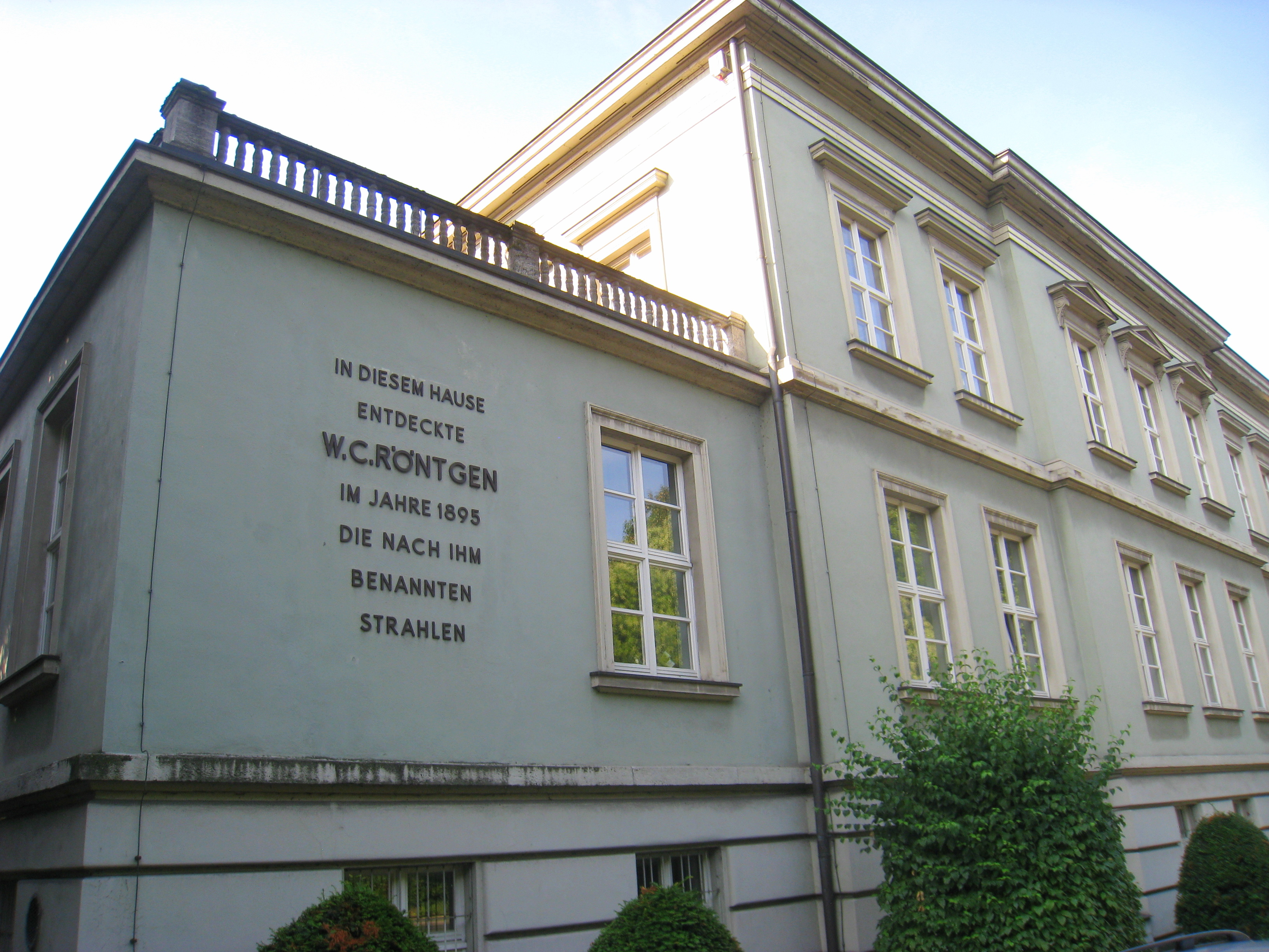 Röntgen laboratory, Julius-Maximilians-Universität Würzburg, Würzburg, Germany.